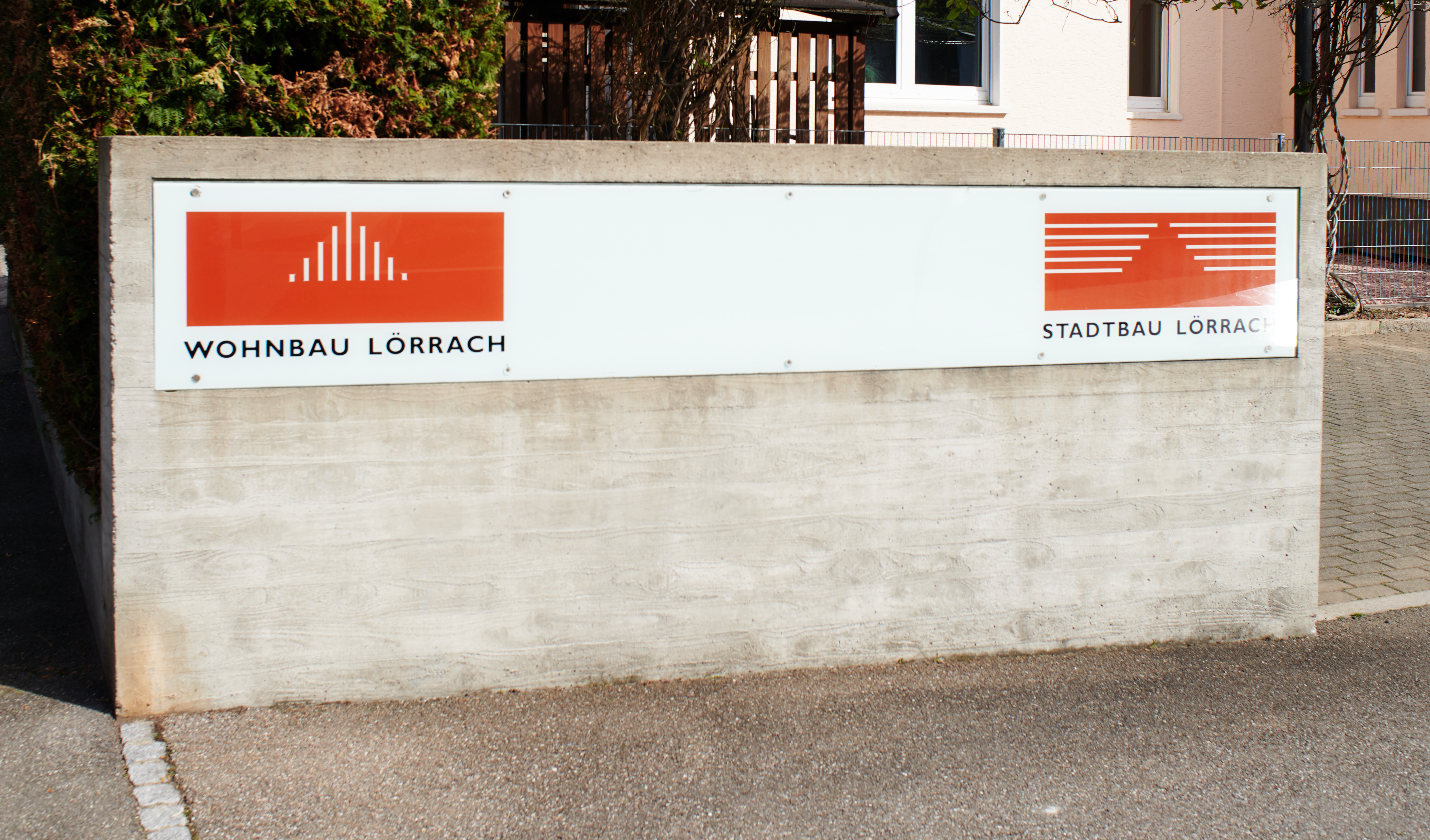 Lörrach: Wohnbau Lörrach, hier: Hauptsitz in der Schillerstraße 4